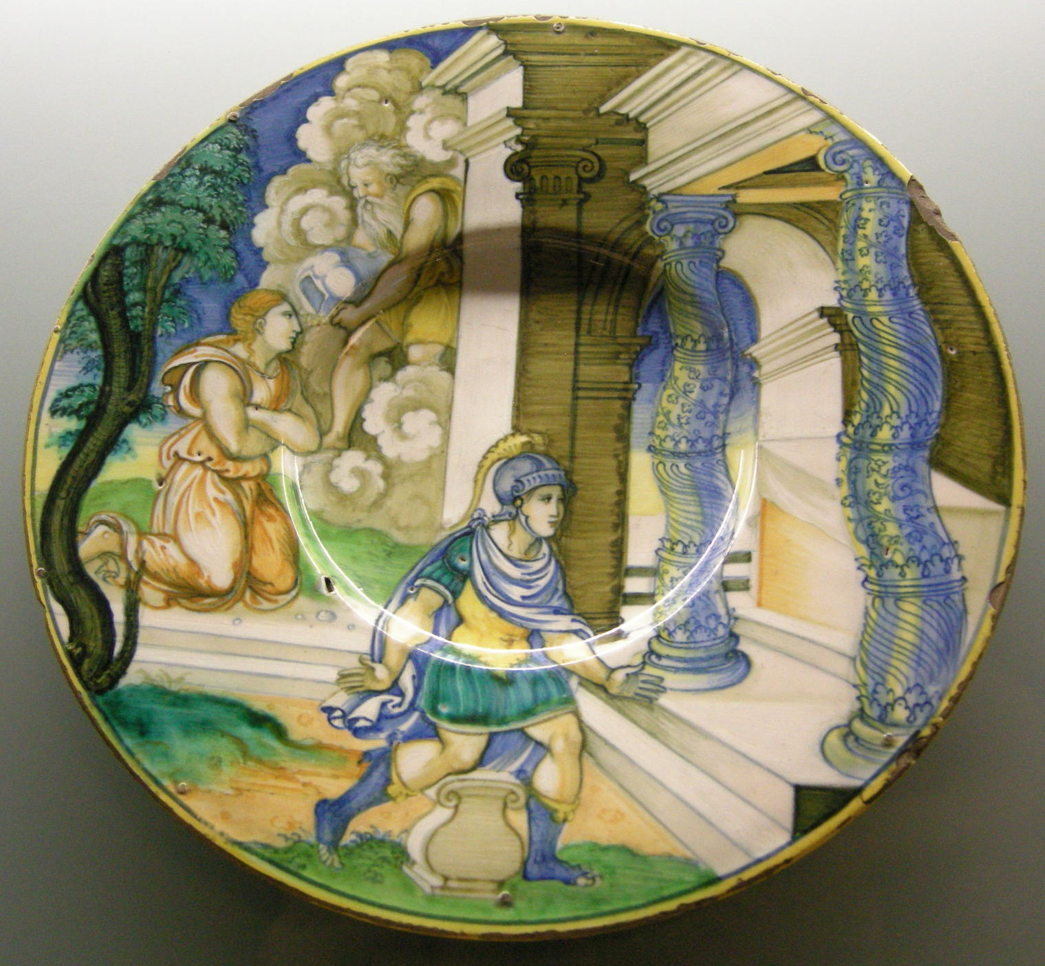 C.sf., urbino, nicola da urbino, piatto con enea che si reca a casa di evandro, 1528-1535 circa